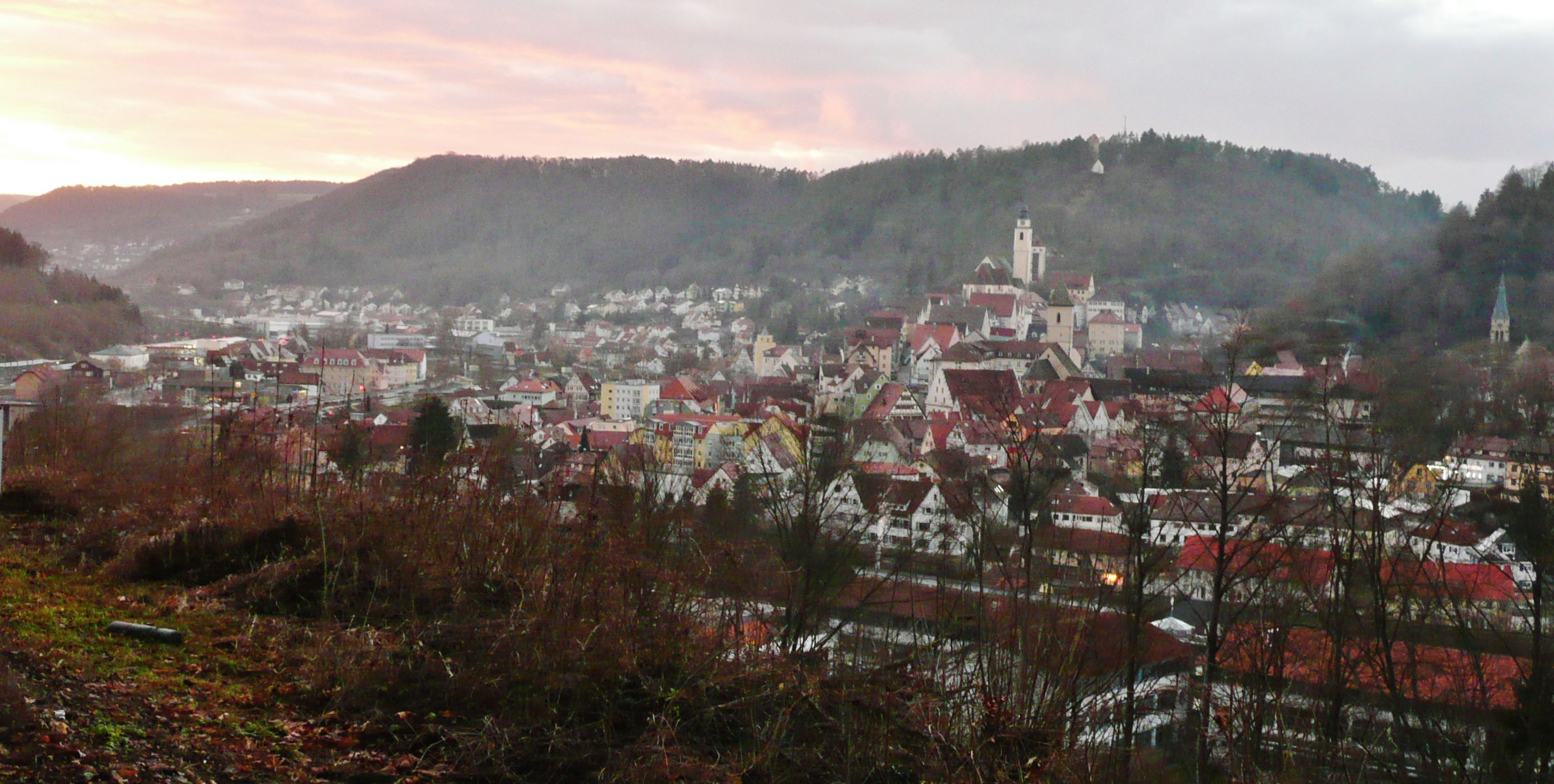 Horb